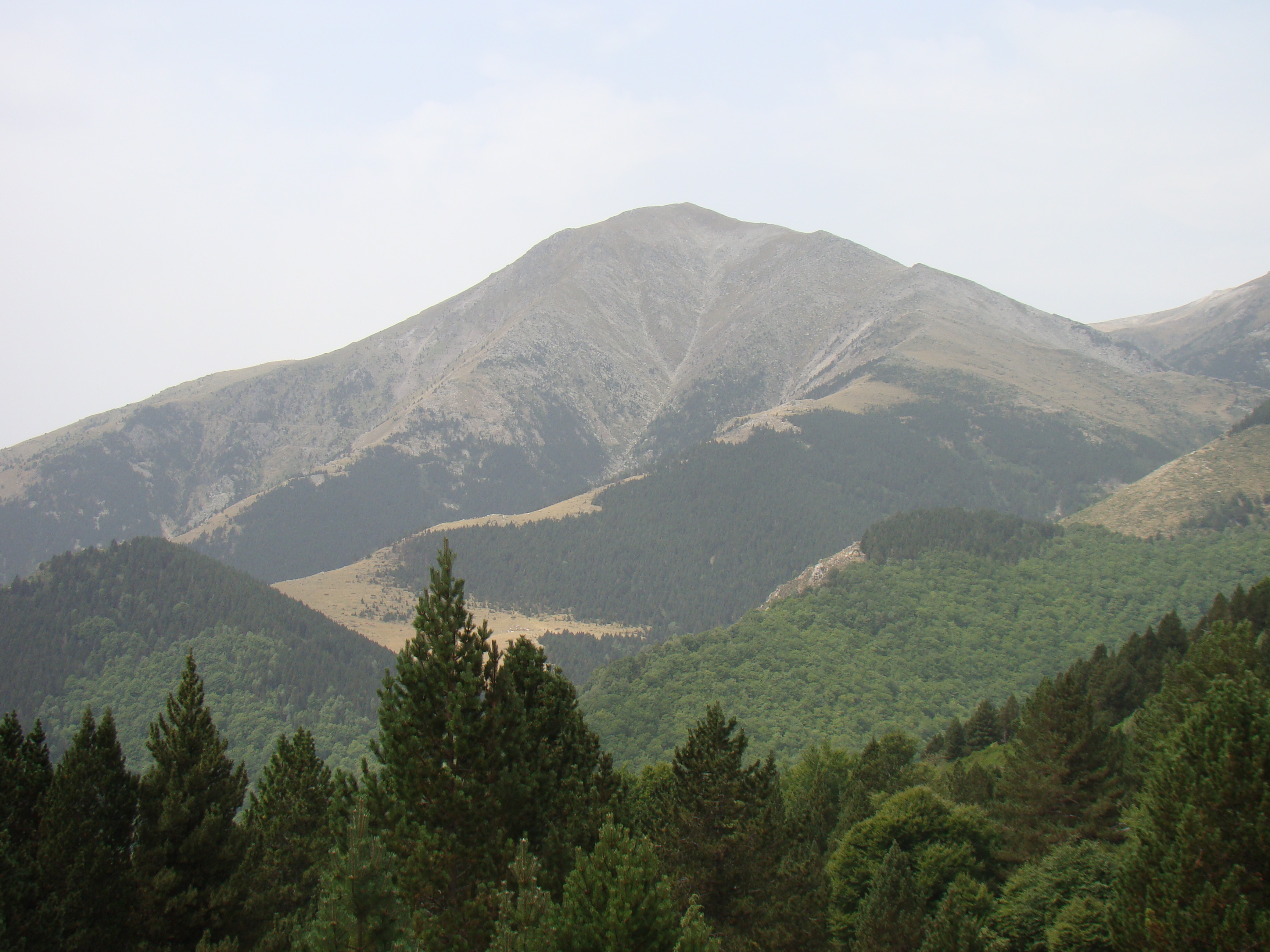 Vue du Costabonne depuis le Coll Baix